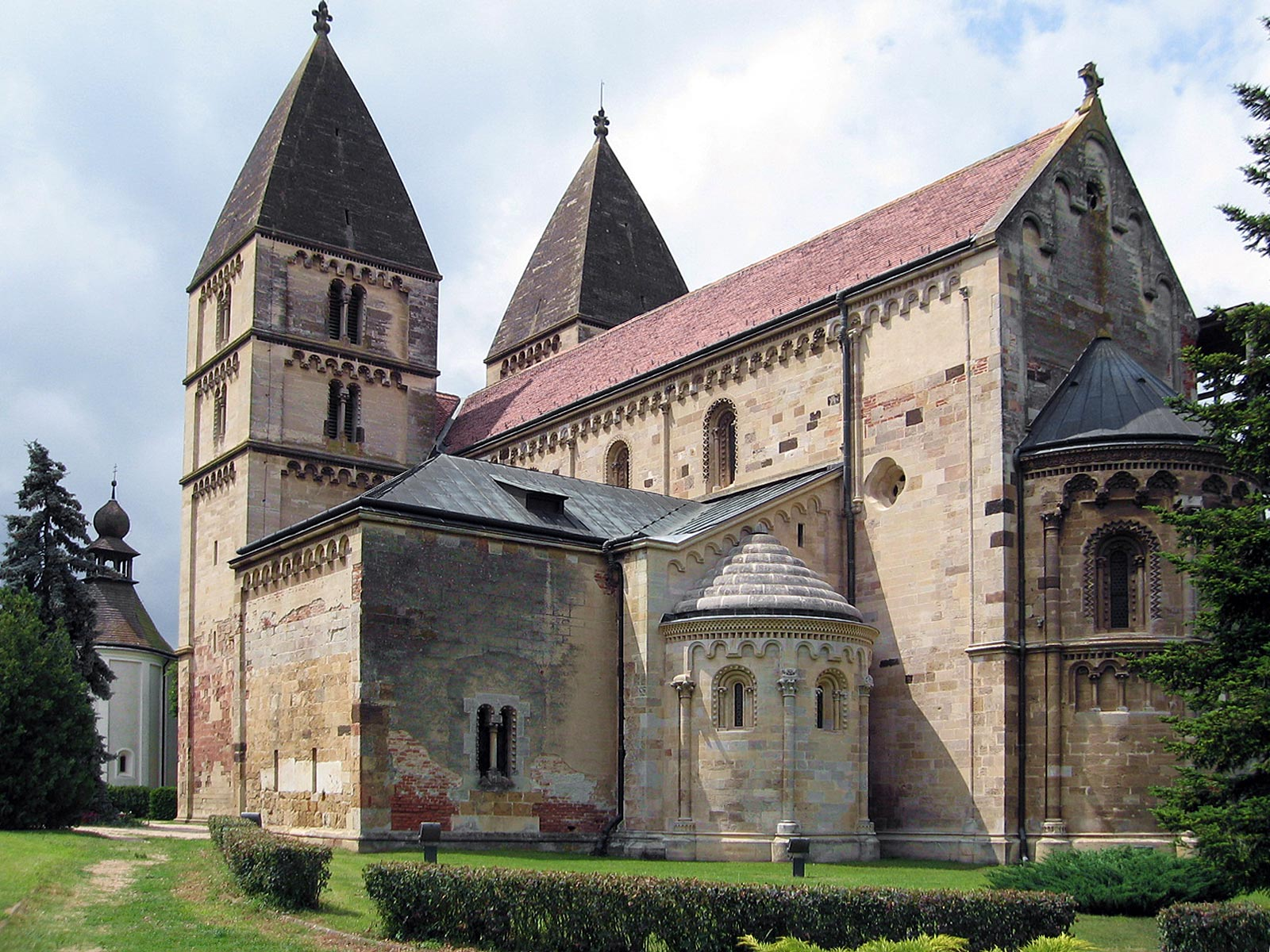 Románkori XIII.századi Jáki templom